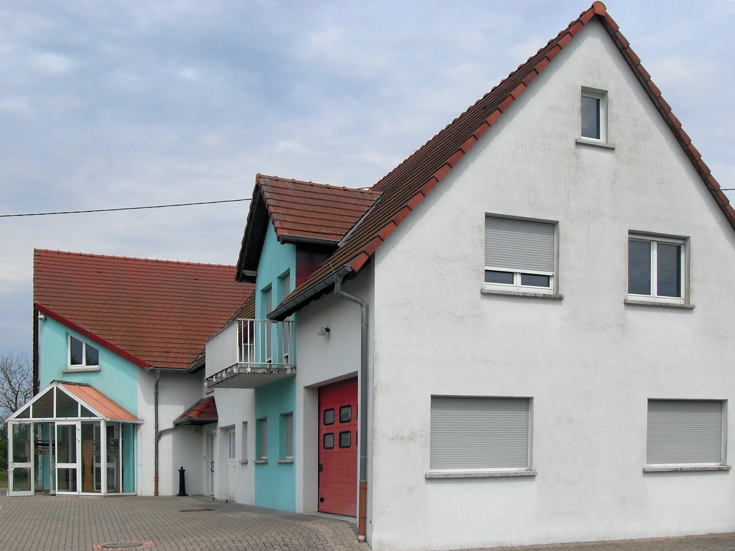 La salle des fêtes à Neuhaeusel